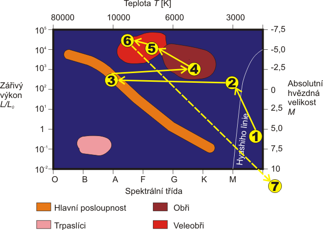 Hertzsprungův-Russellův diagram: vývoj hvězdy o hmotnosti 50 MS